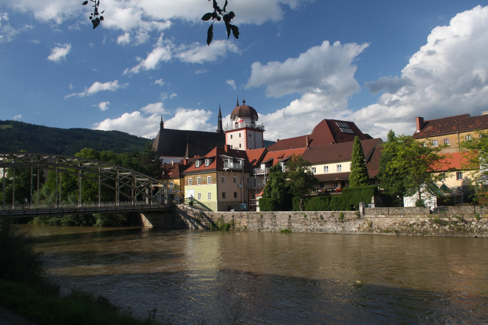 Leoben mit Schwammerlturm